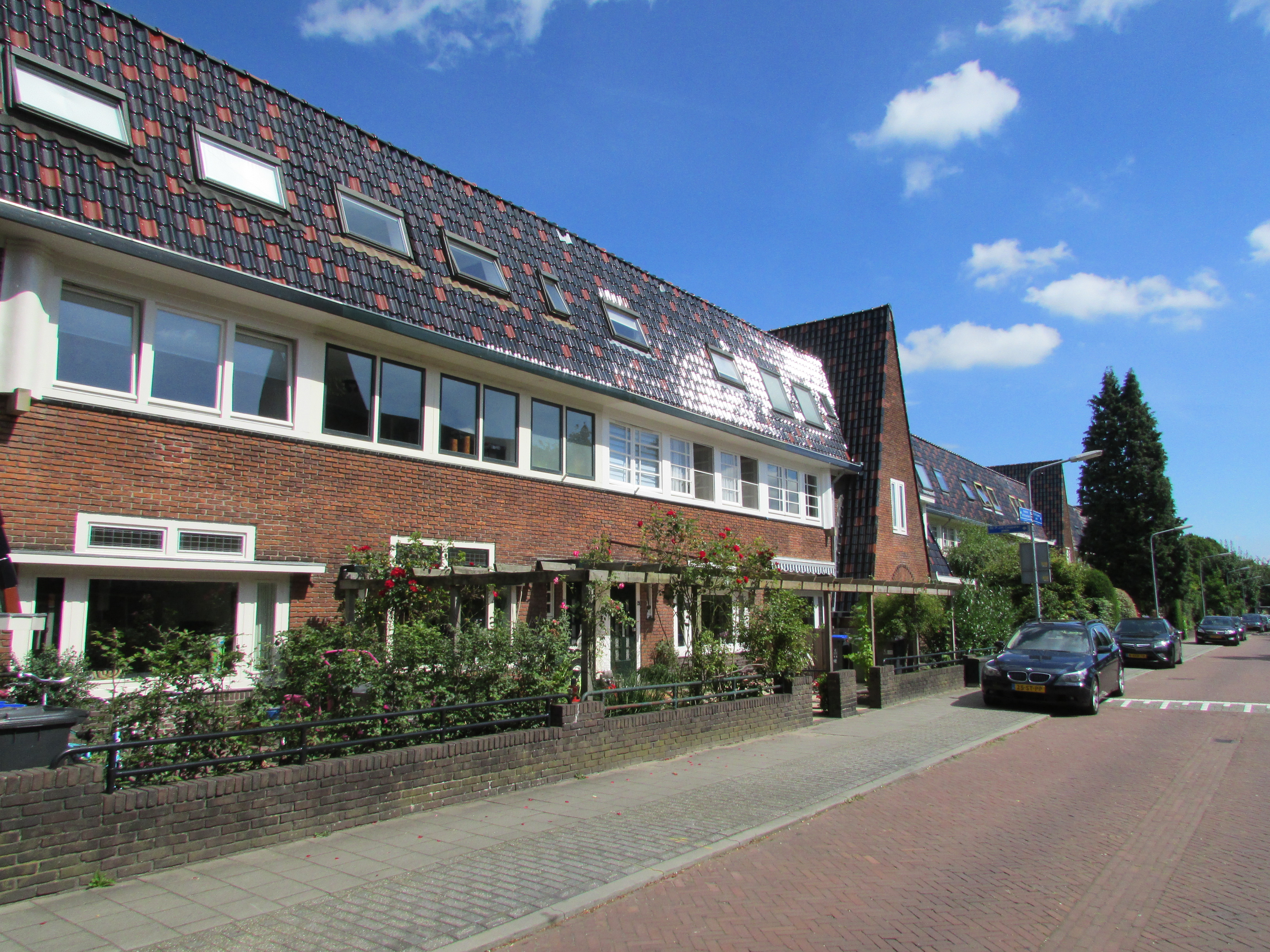 Dr. P.J.H. Cupersplein met fraaie woningen. Gemeentelijk monument.